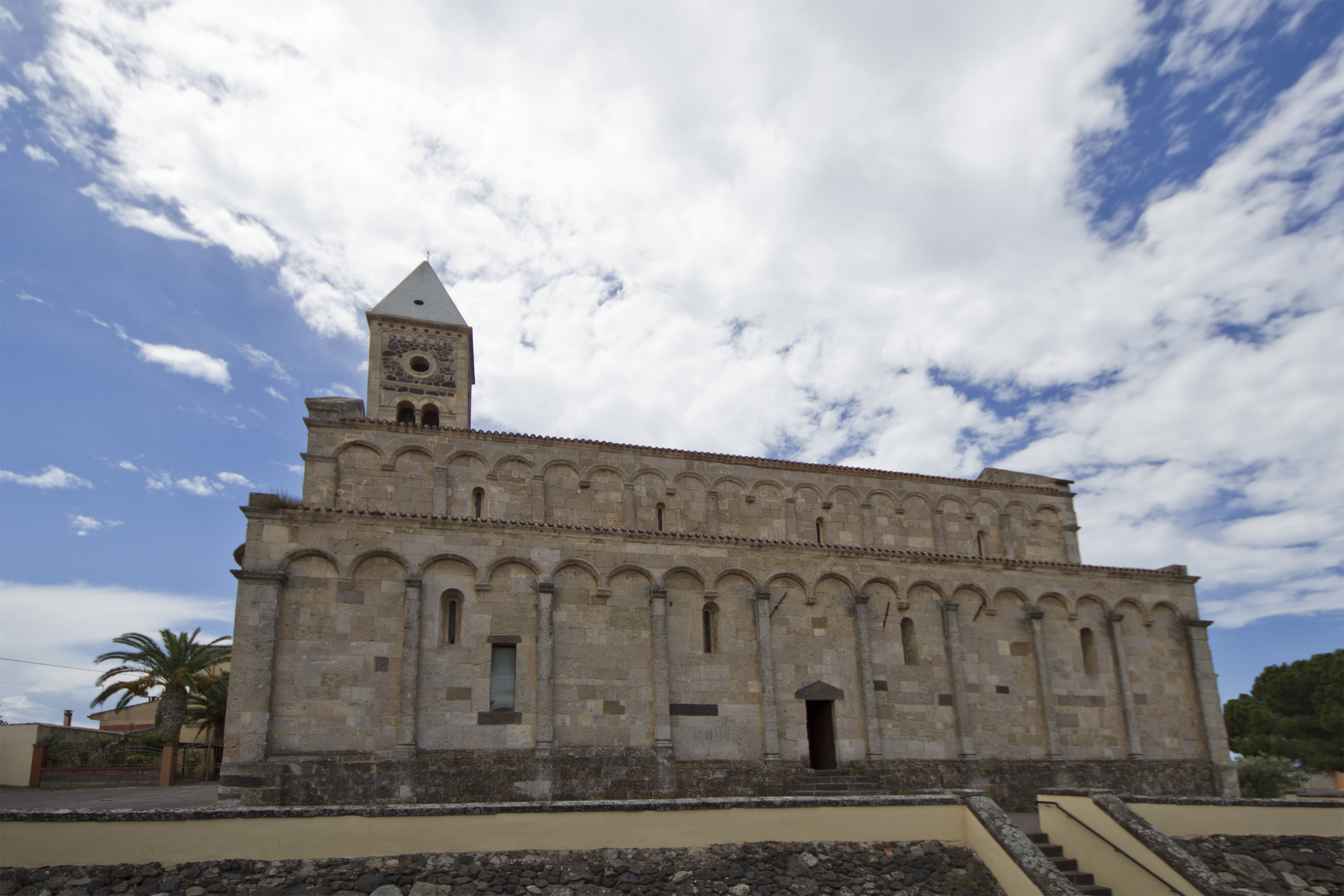 La chiesa di Santa Giusta, Santa Giusta OR, Sardinia, Italy